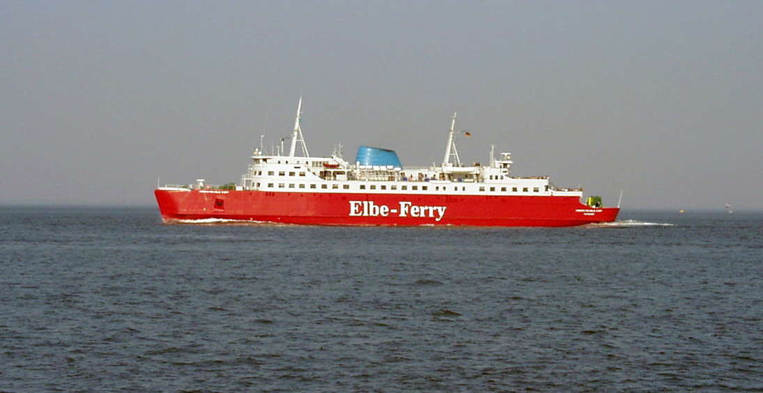 Die Fähre zwischen Cuxhaven und Brunsbüttel Schiff: Hinrich Wilhelm Kopf, ex-Prinsesse Elisabeth